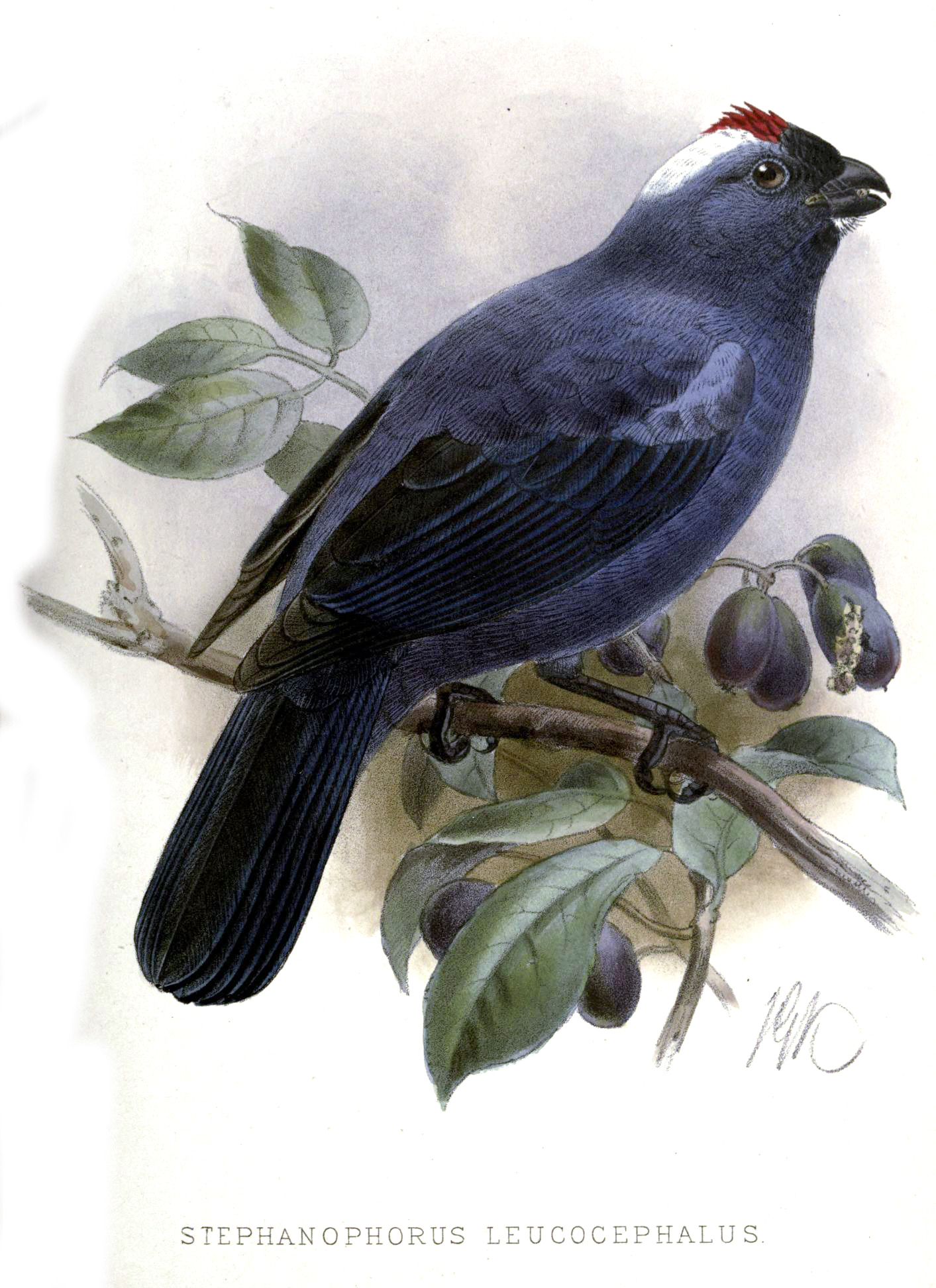 Stephanophorus leucocephalus = Tanagra diademata[1] = Stephanophorus diadematus[2]